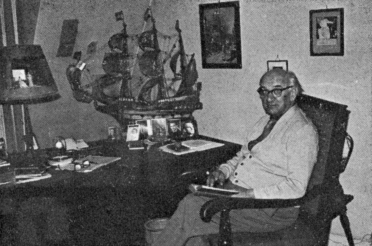 August Momber in seinem Heim in Karlsruhe um 1966